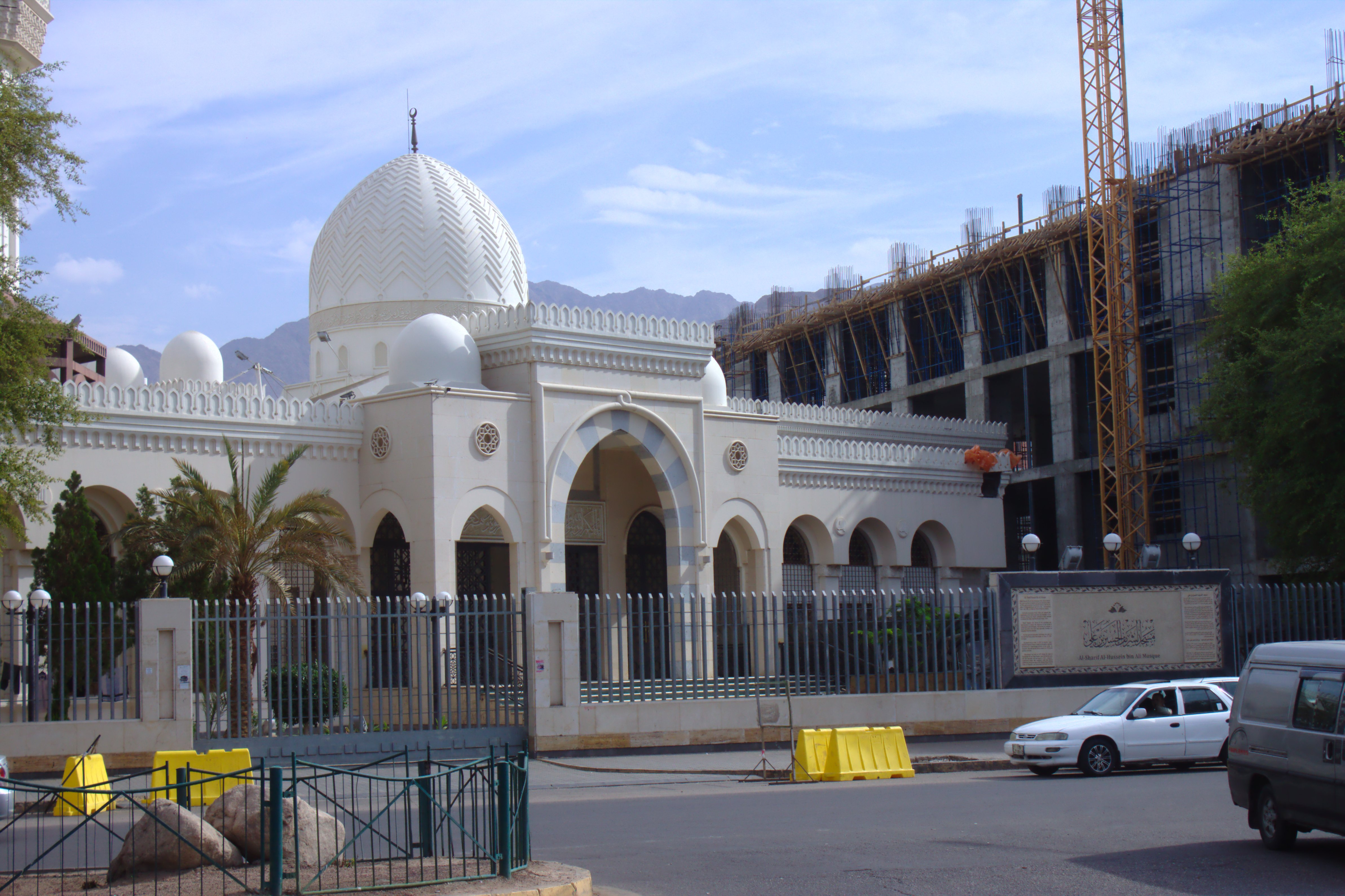 Mešita ve městě Aqaba, Jordánsko